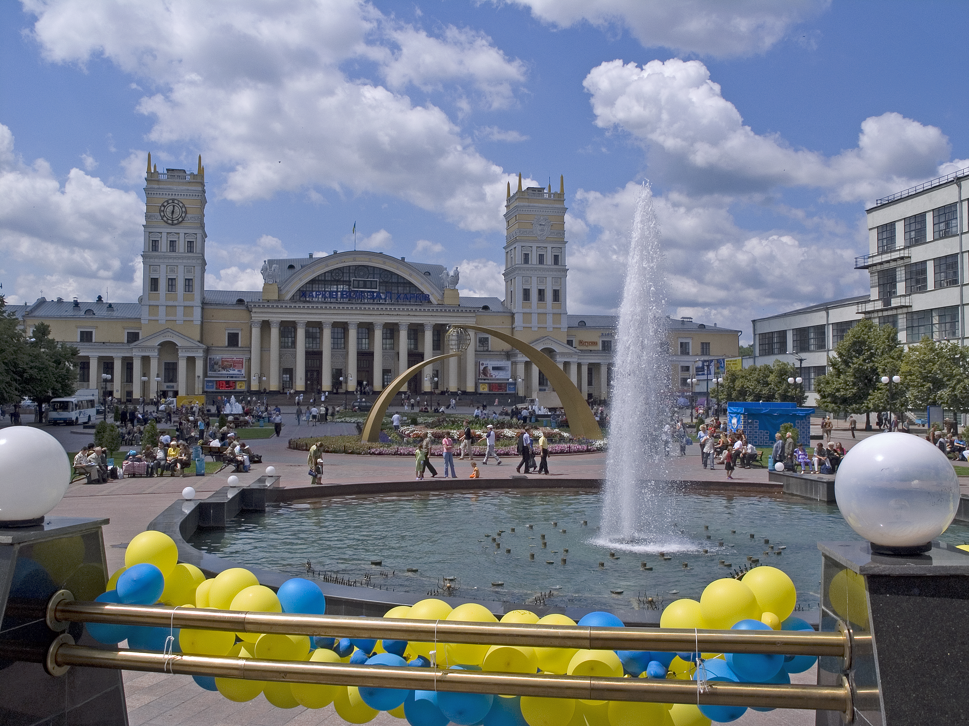 Украина, Харків - Залізничний вокзал